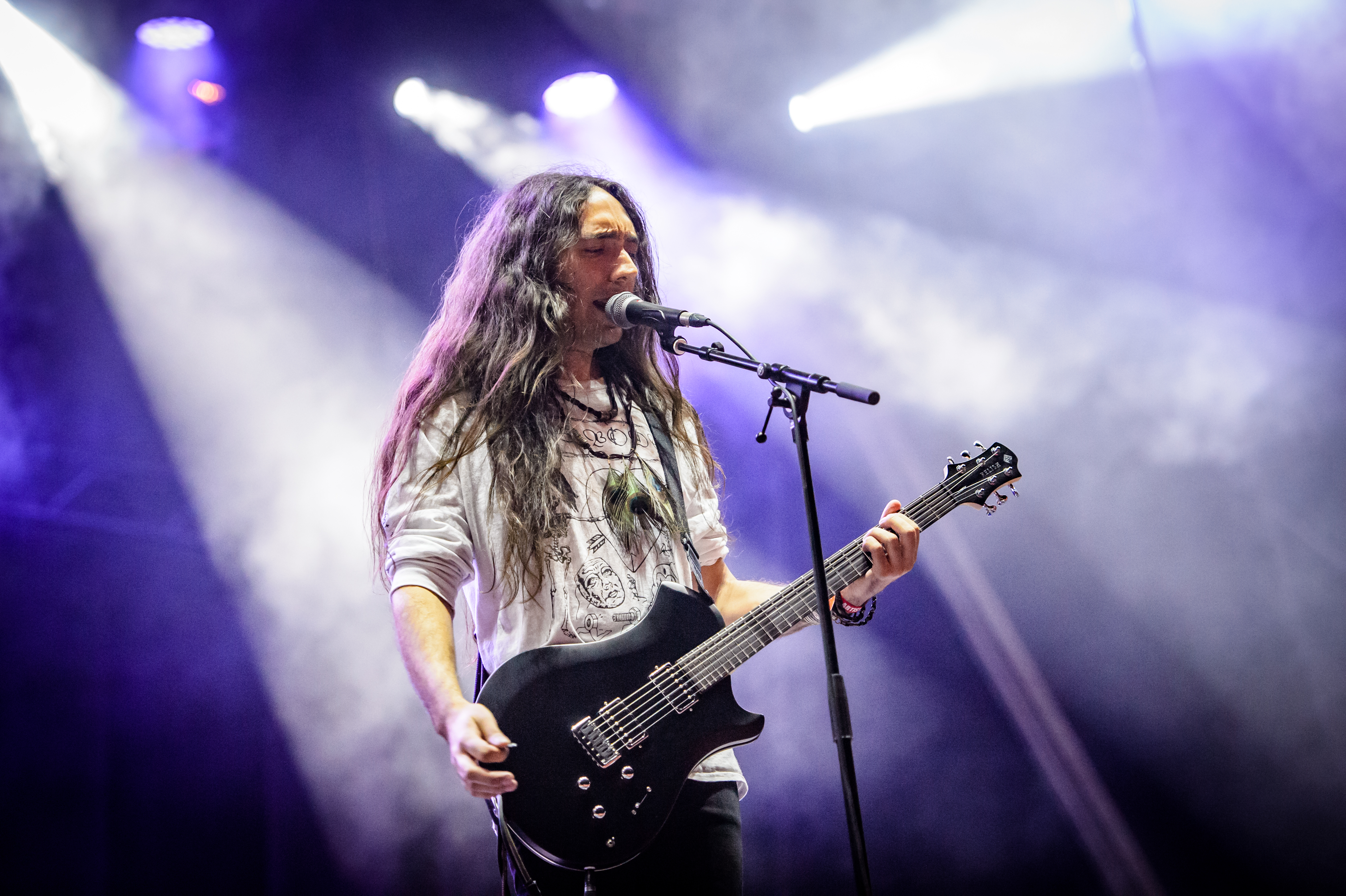 'RockHarz Open Air 2017; Ballenstedt': 'Alcest'